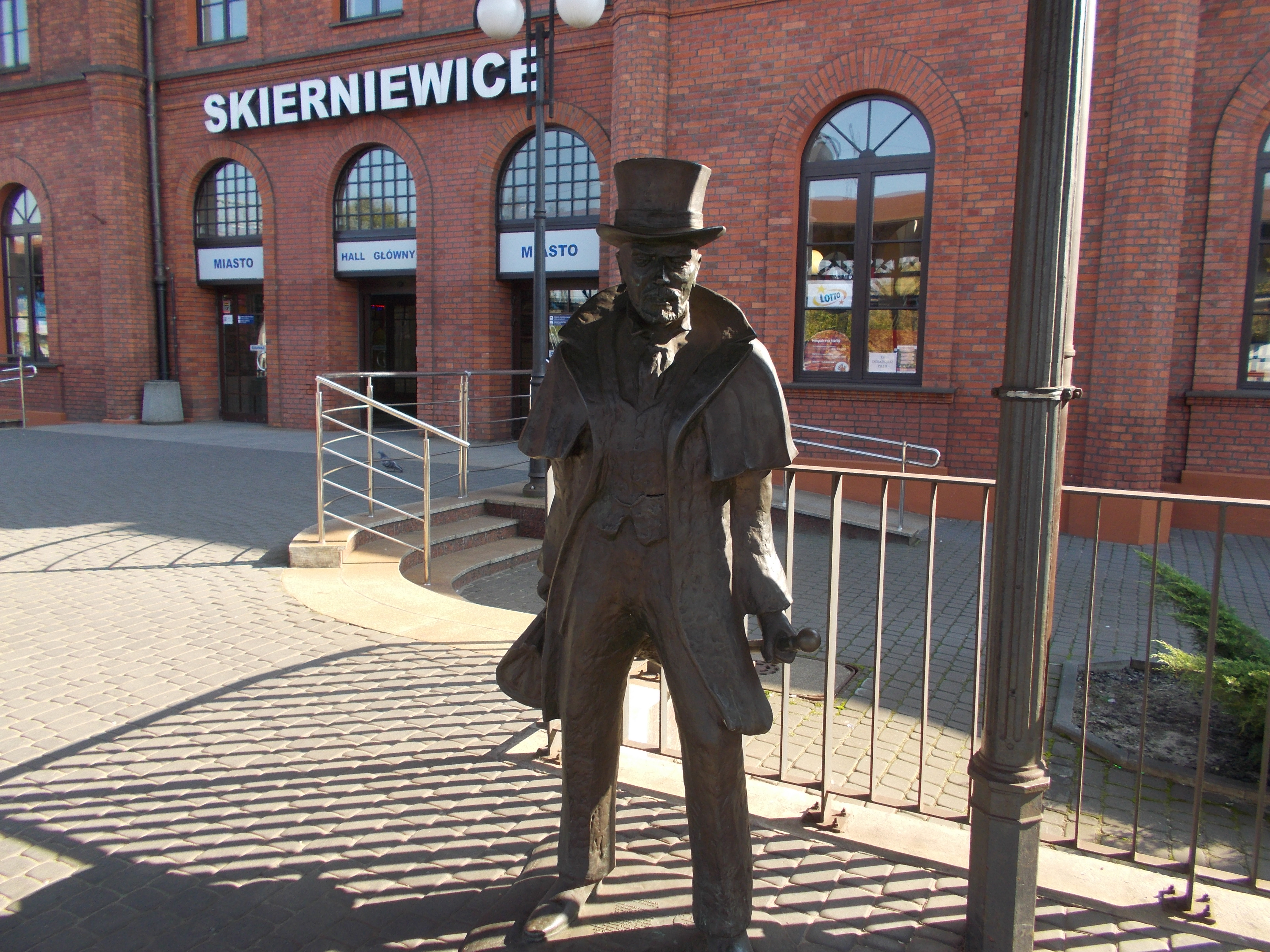 Dworzec kolejowy w Skierniewicach. Pomnik Stanisława Wokulskiego z powieści "Lalka" Bolesława Prusa.